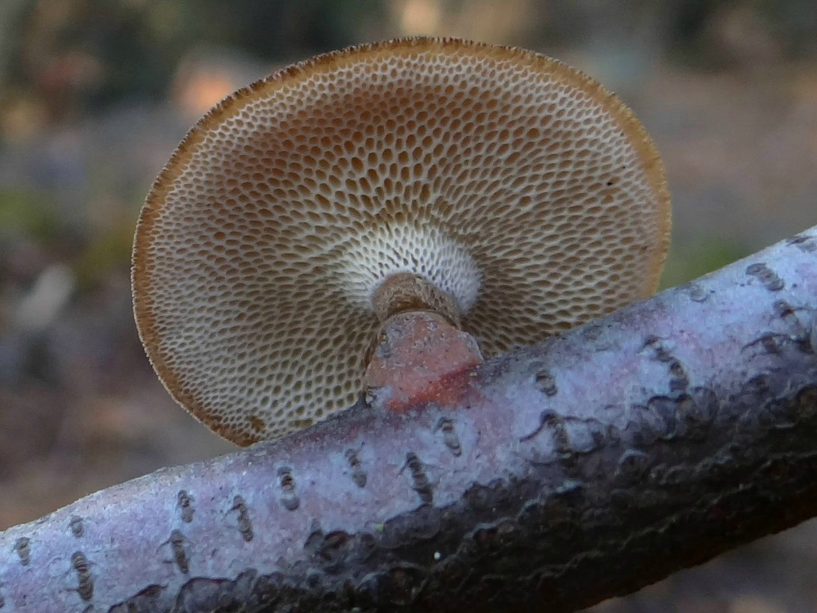 Polyporus brumalis